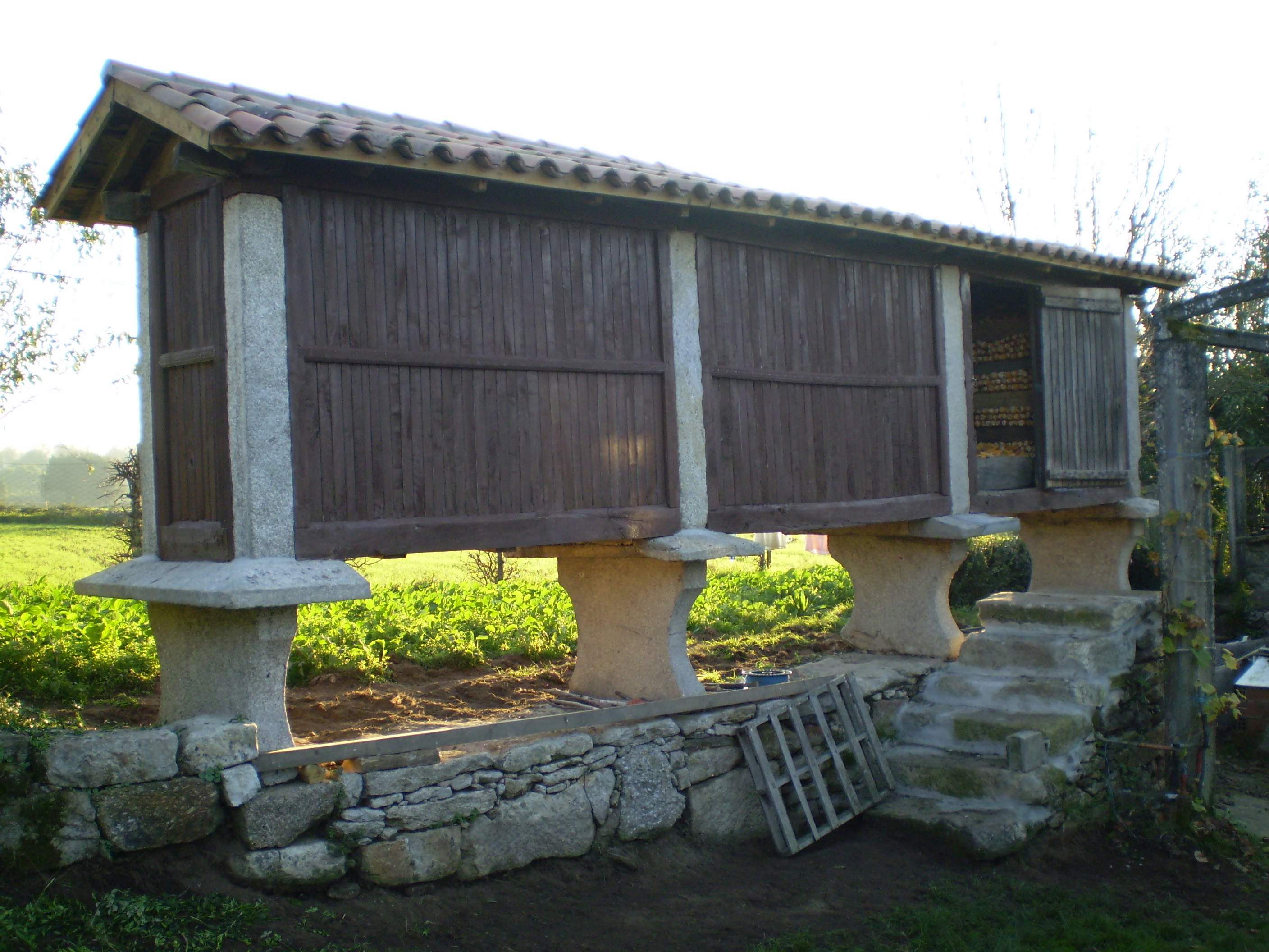 Hórreo en Vilariño (Antas de Ulla)